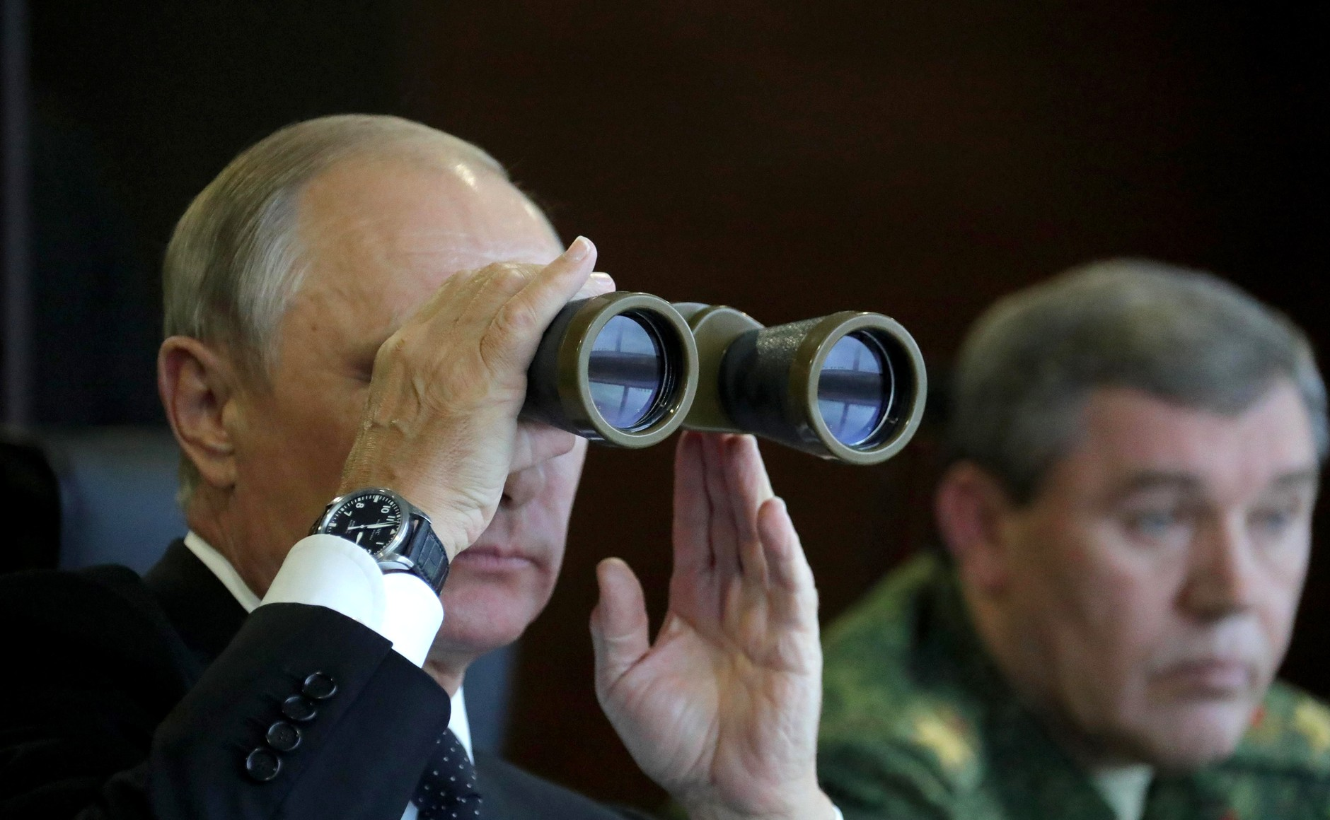 Президент России Владимир Путин на полигоне Лужский во время основного этапа совместных российско-белорусских стратегических учений «Запад-2017»